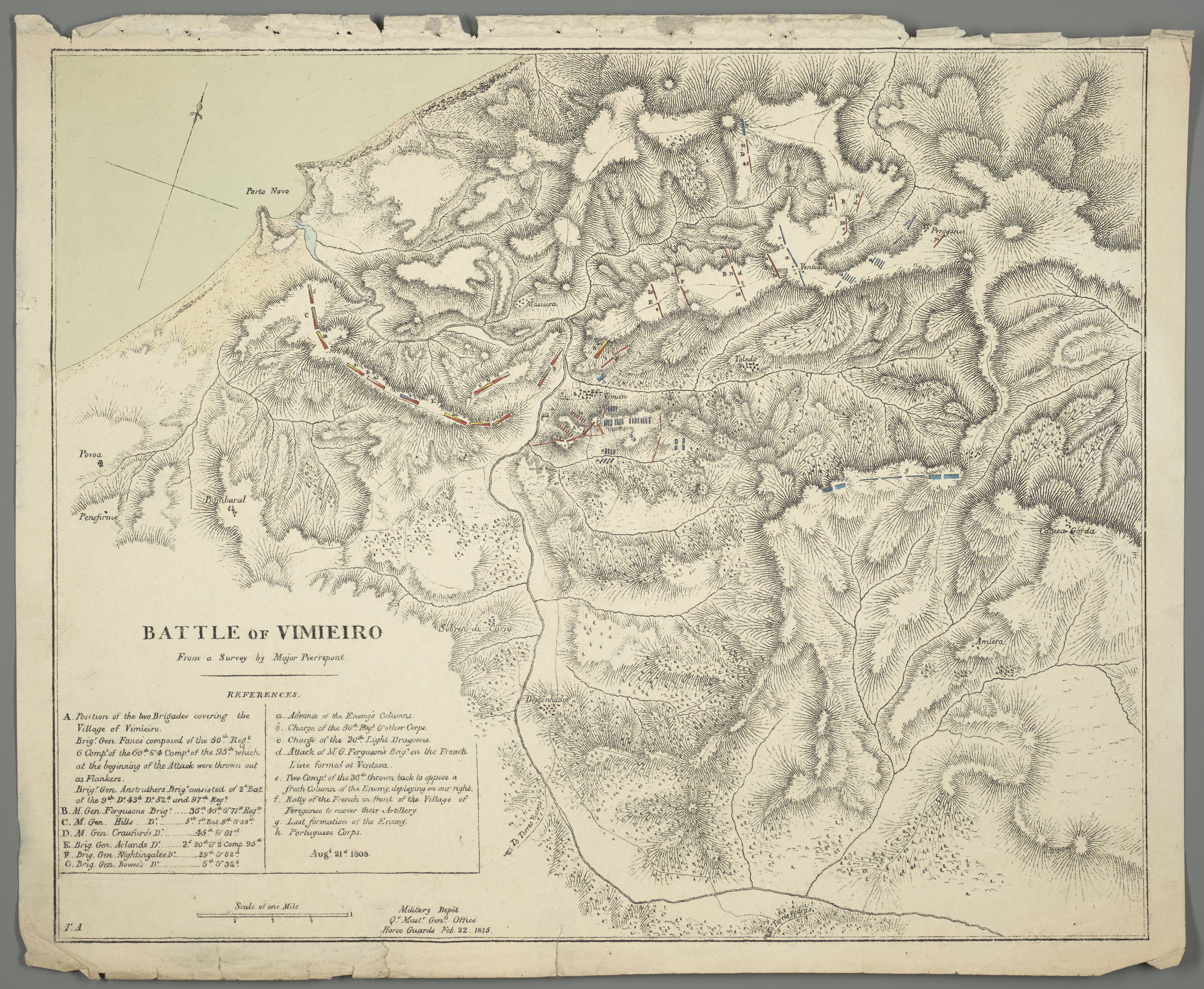 1 Kt. : teilw. kolor. (46 x 37 cm) ; Koordinaten W 9°21'57"-W 9°15'17"/N 39°12'32"-N 39°08'00" ; Maßstab in graph. Form (Mile). - Titel und Maßstab unten links. - Mit Truppenstellungen. - Erl. der Truppenstellungen unten links. - Abkürzung unten links: T. A. - Mit Bergschraffen. - Titel und Erl. in engl.